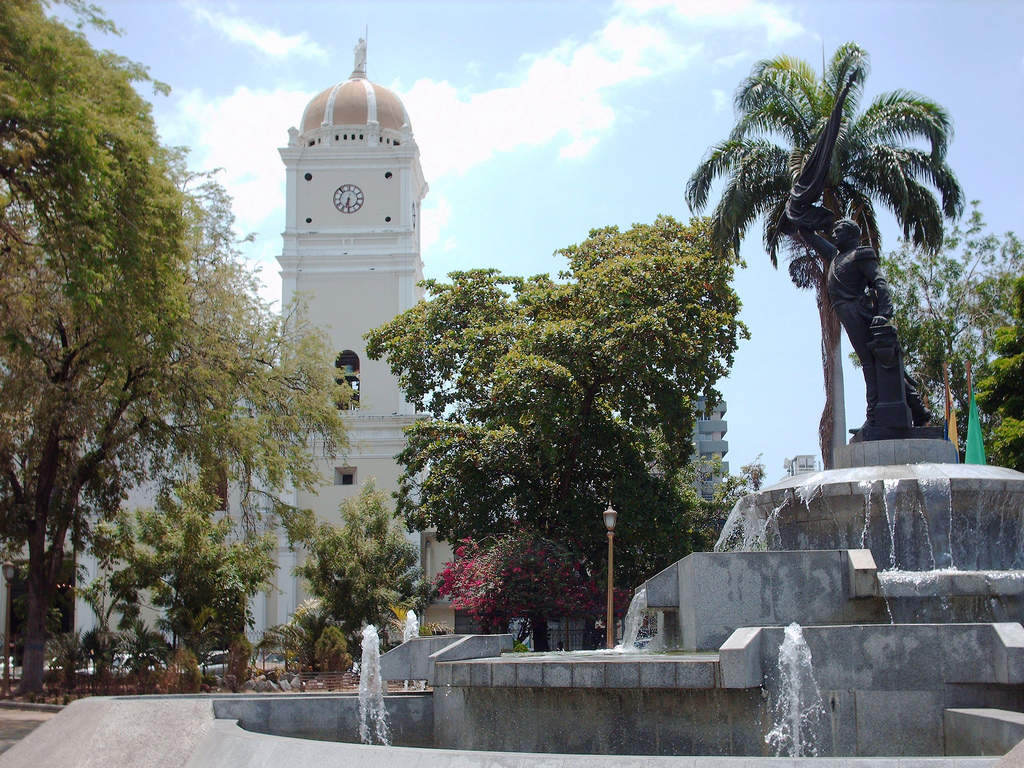 Plaza Girardot